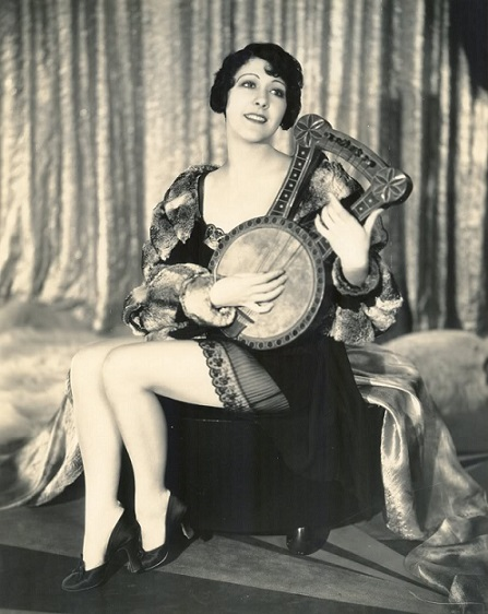 Ethlyne Clair